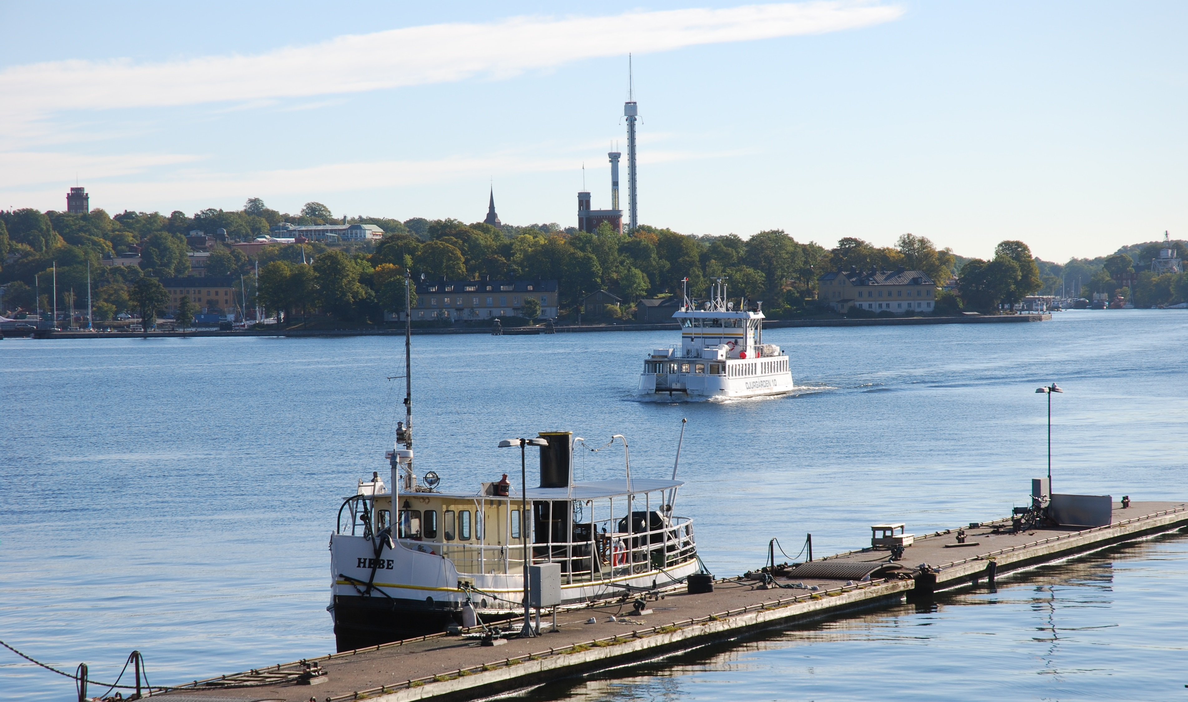 Hebe med Djurgården 10 i bakgrunden vid Slussen This is an image of a protected Swedish ship, with call sign SFB 7528 .